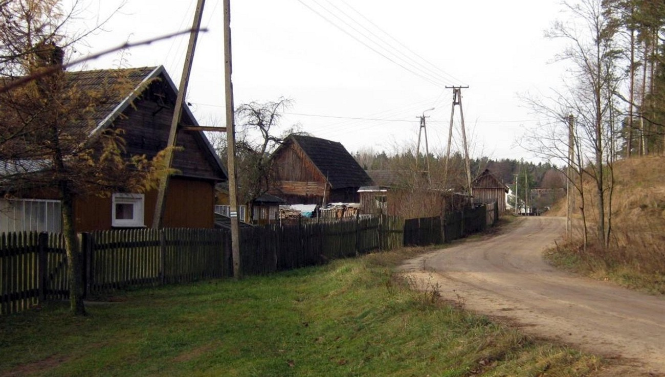 Ulica w "starej" Żedni.